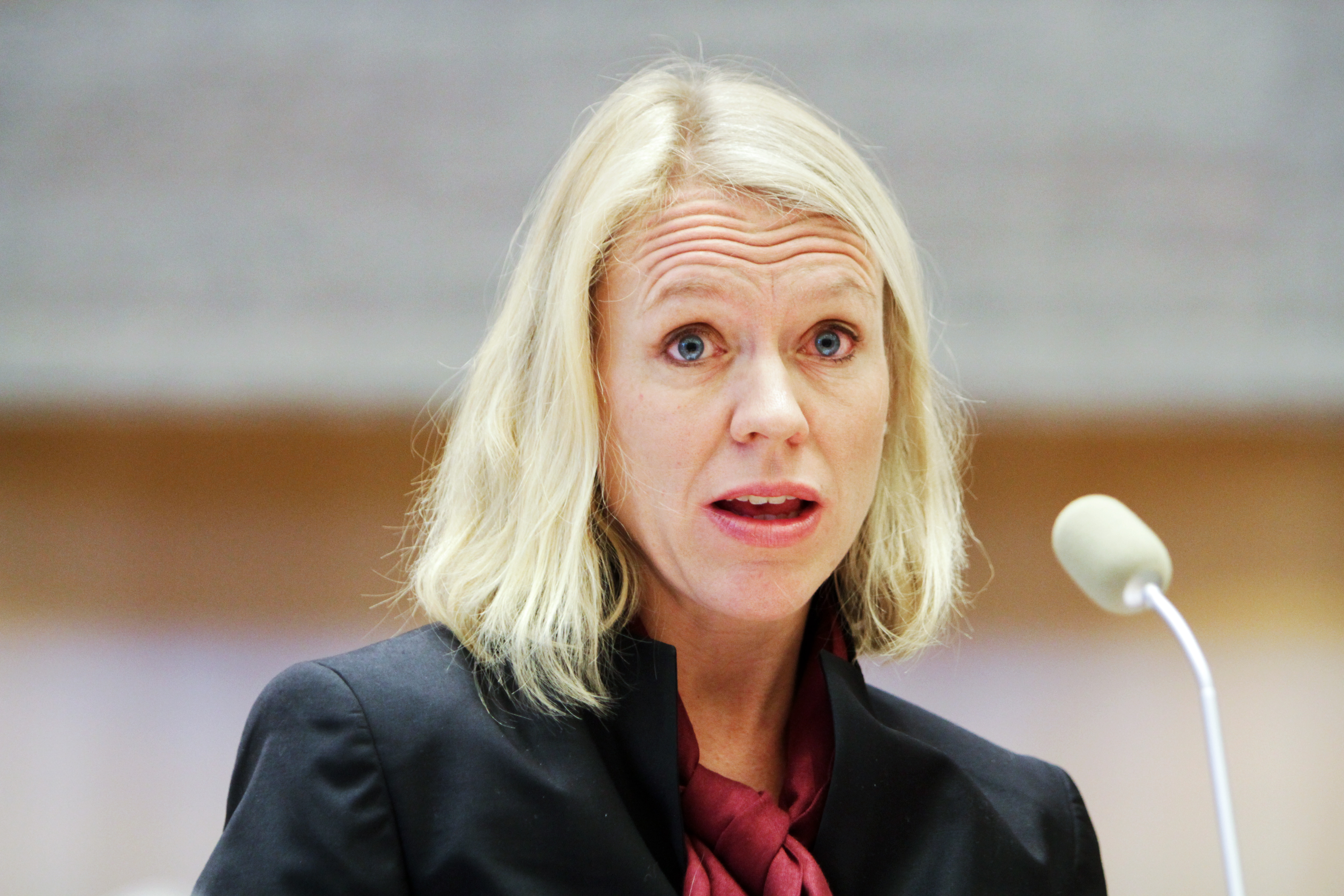 Norges kulturminister Anniken Huitfeldt vid Nordiska Rådets session i Stockholm